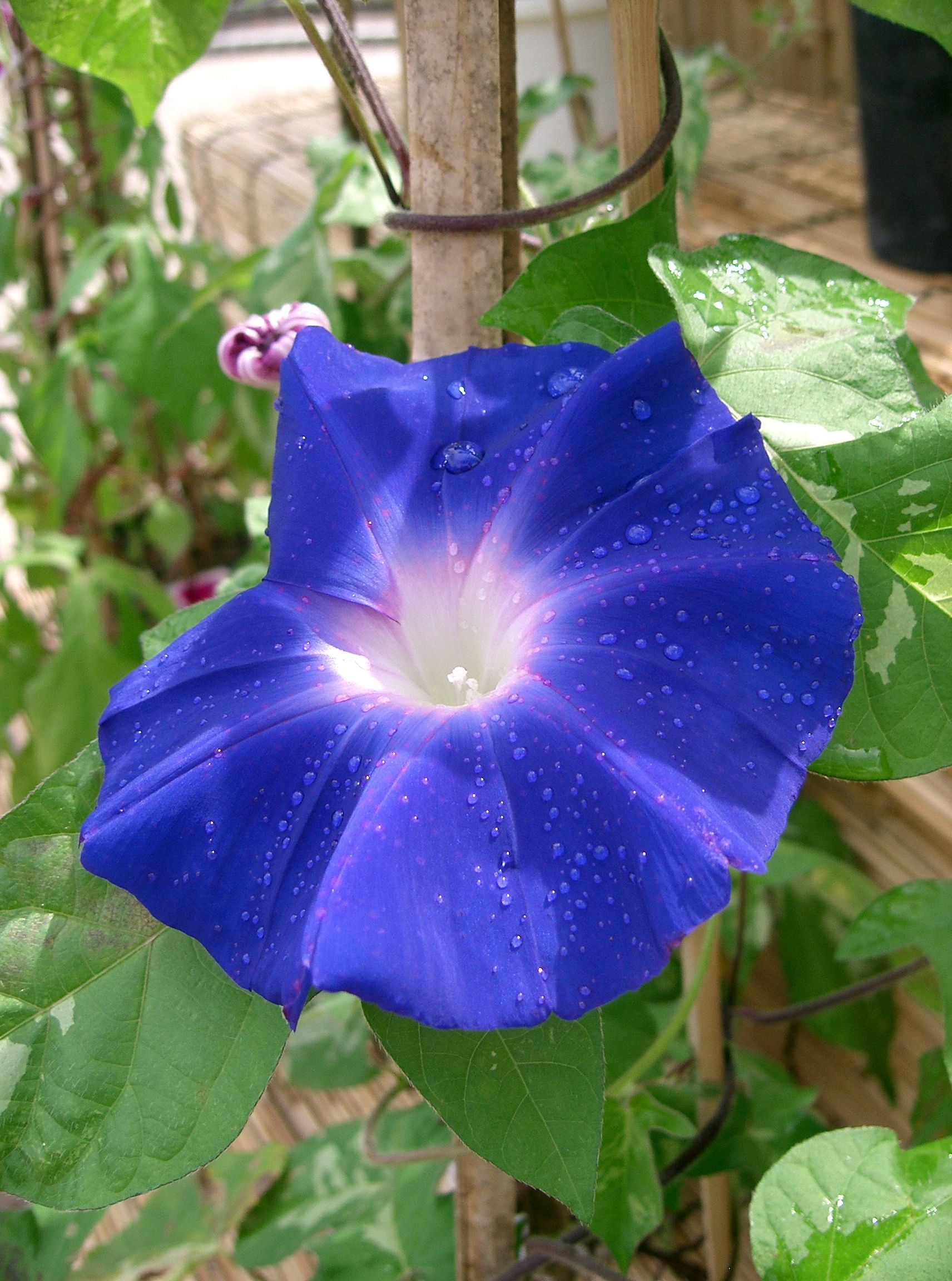 Ipomoea nil 'Akatsukinoumi'